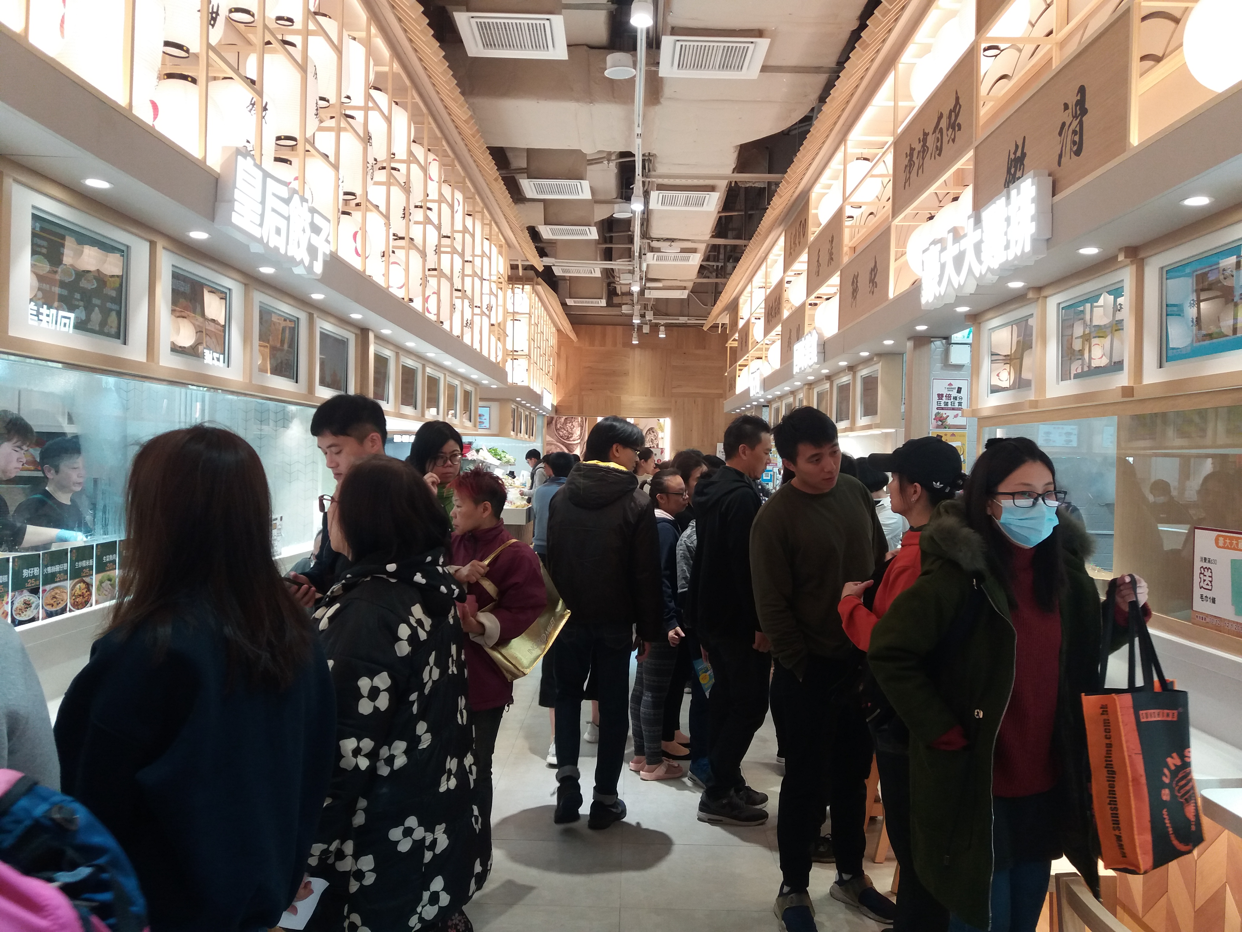 中文（香港）: 頌富市場內的餐廳